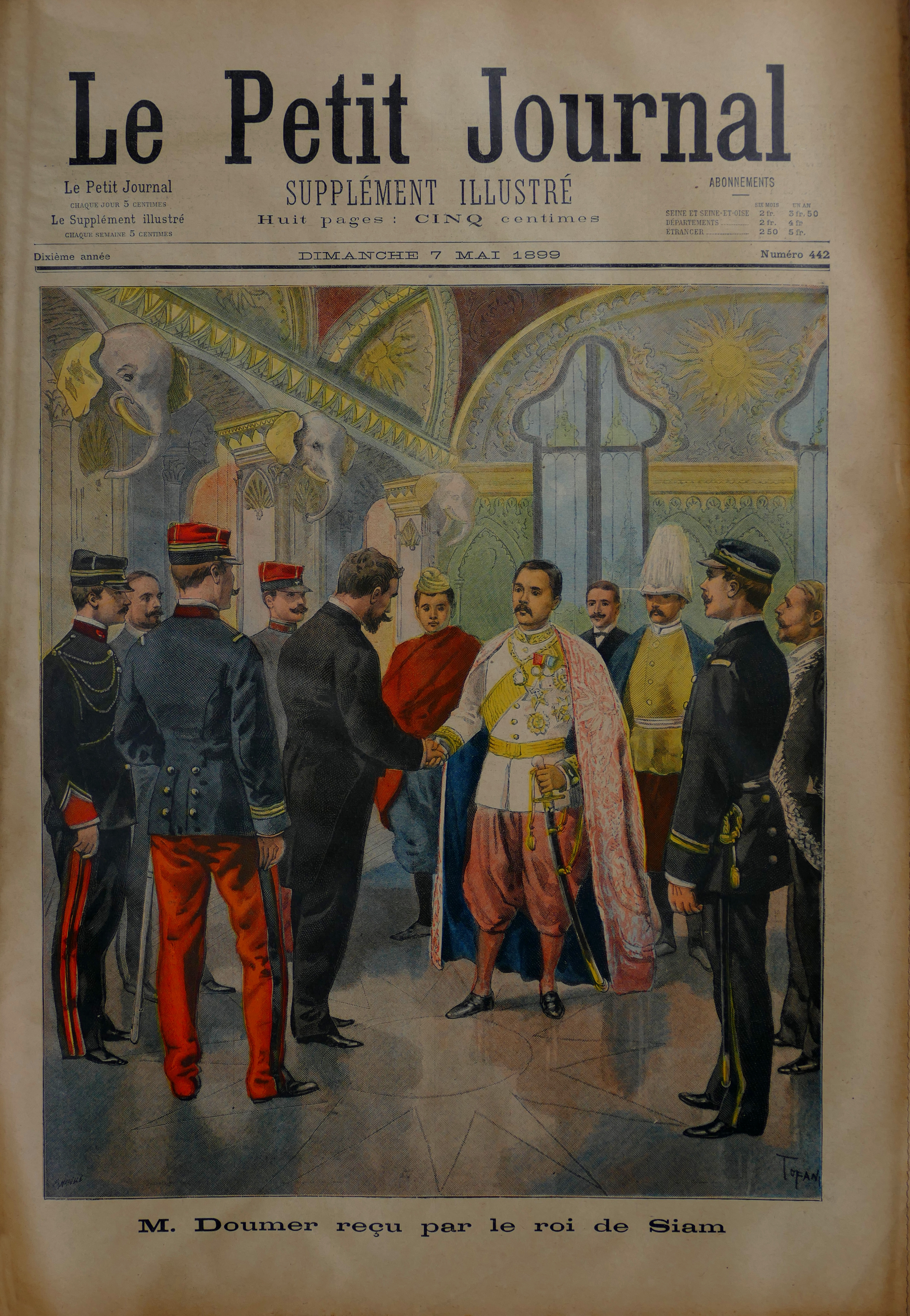 Paul Doumer en voyage au Siam 1899. Supplément Le Petit Journal n°442, 7 mai 1899. Gravure de Louis-Fortuné Méaulle. Collection personnelle.